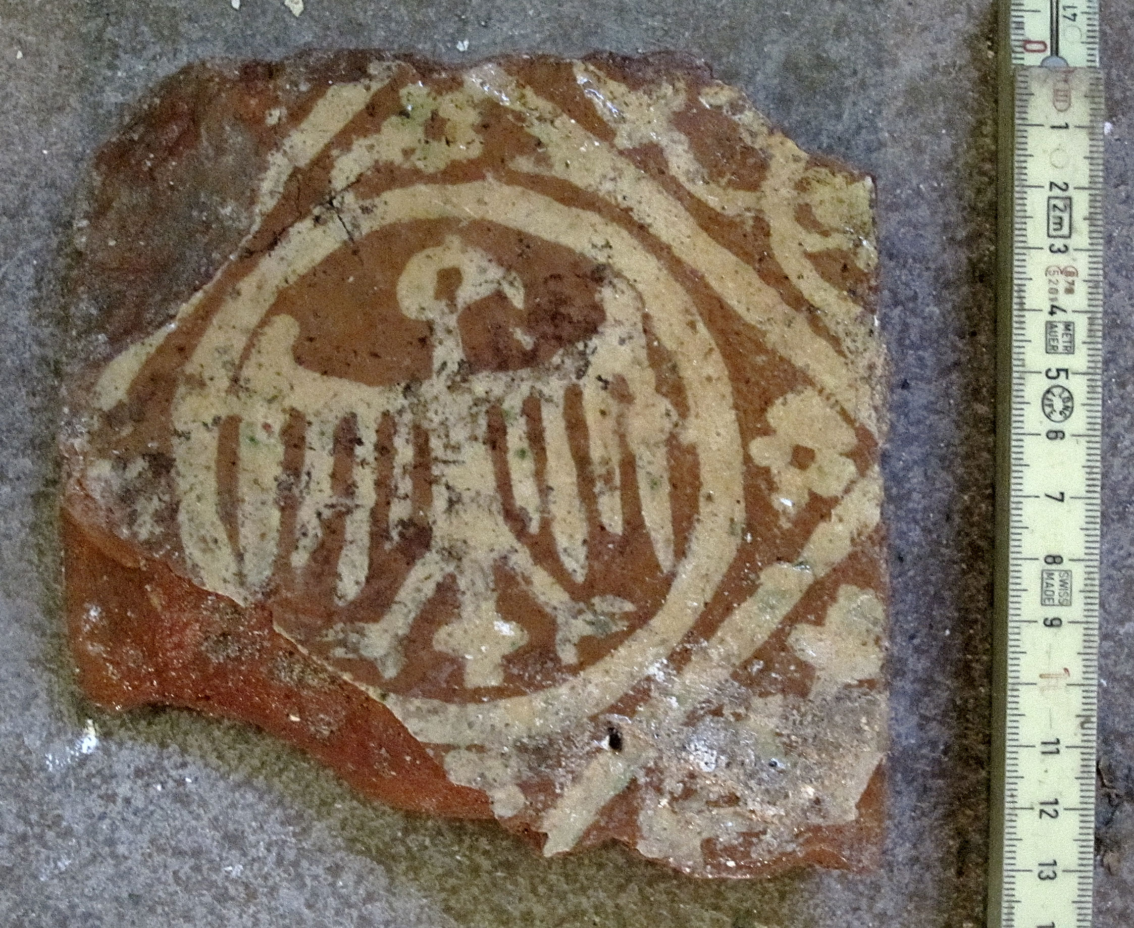 Carreau provenant de l'ancienne abbaye cistercienne de Bellevaux